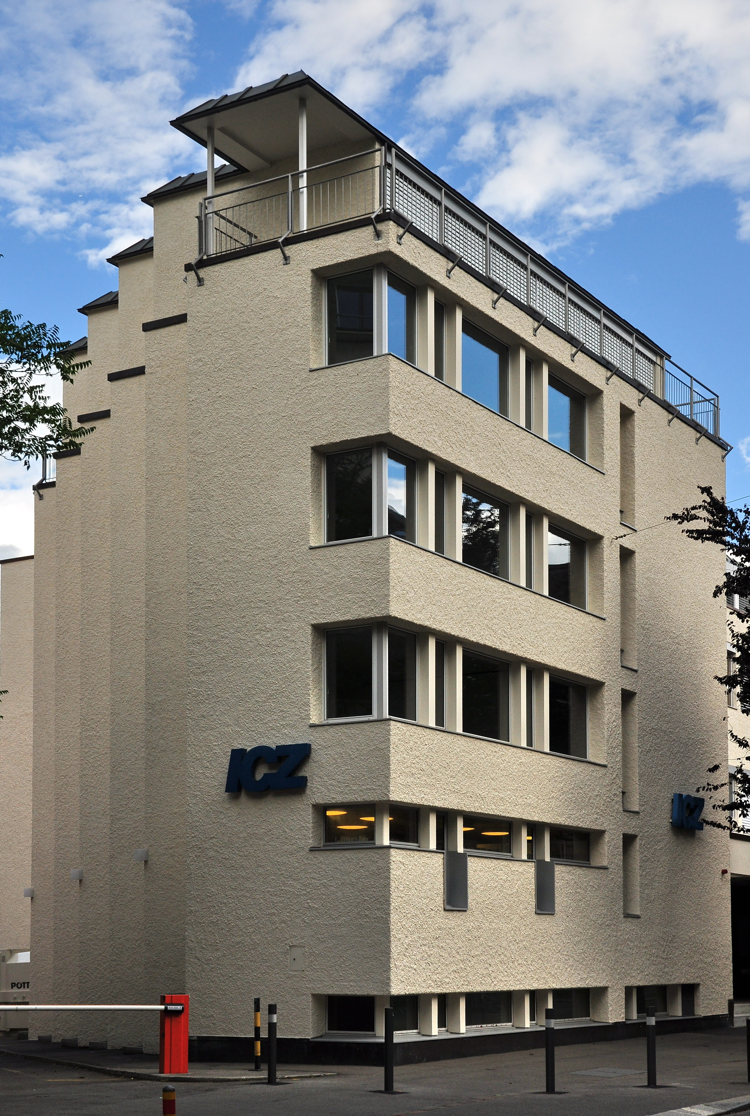 Israelitische Cultusgemeinde, Lavaterstrasse in Zürich-Enge (Switzerland)